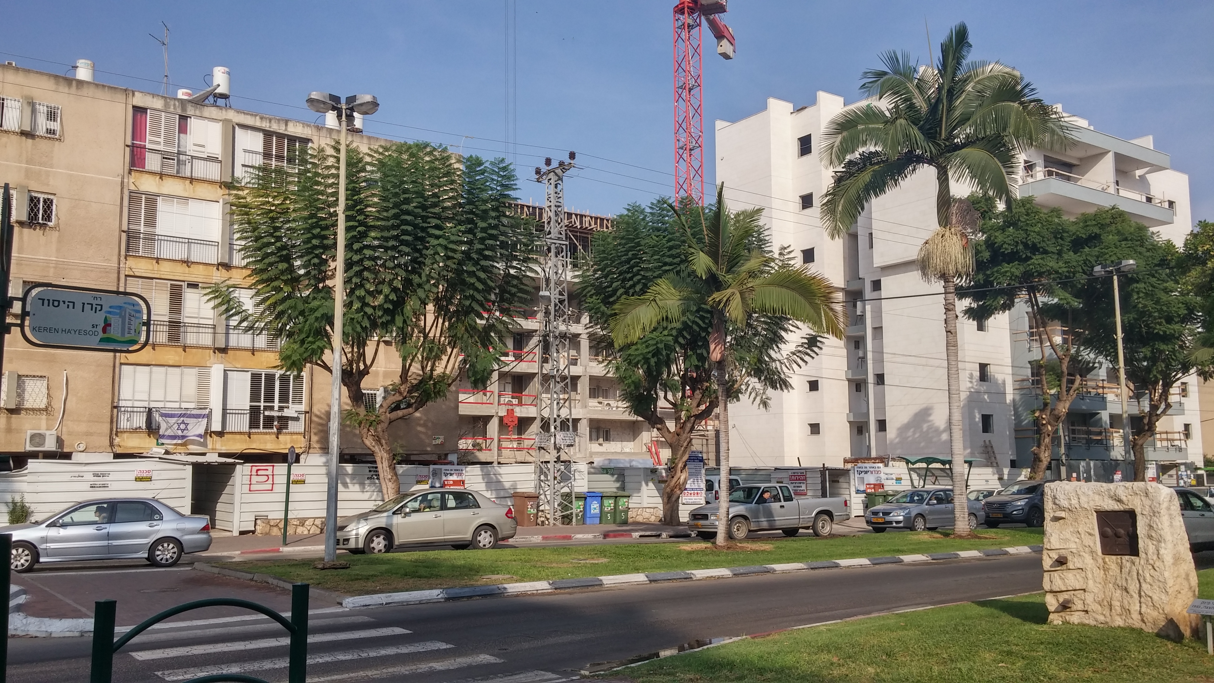 שלושה בניינים סמוכים ברעננה, בשלושה שלבים של תמ"א 38